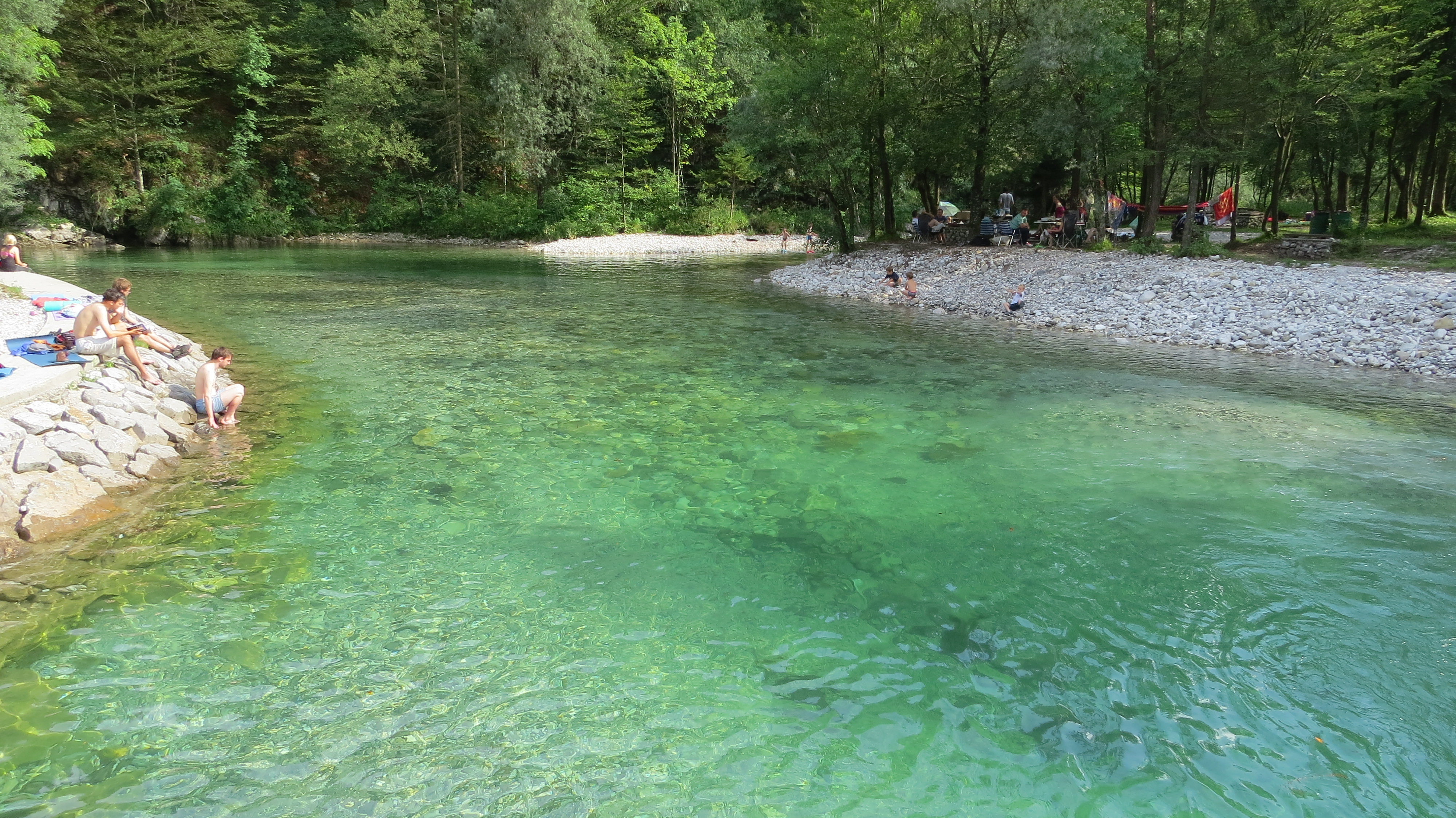 Kopališče Na Lajštu.